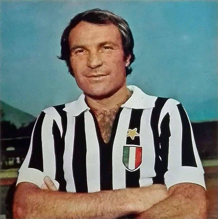 Il calciatore italo-brasiliano José João Altafini "Mazzola" alla Juventus nella stagione 1972-73.